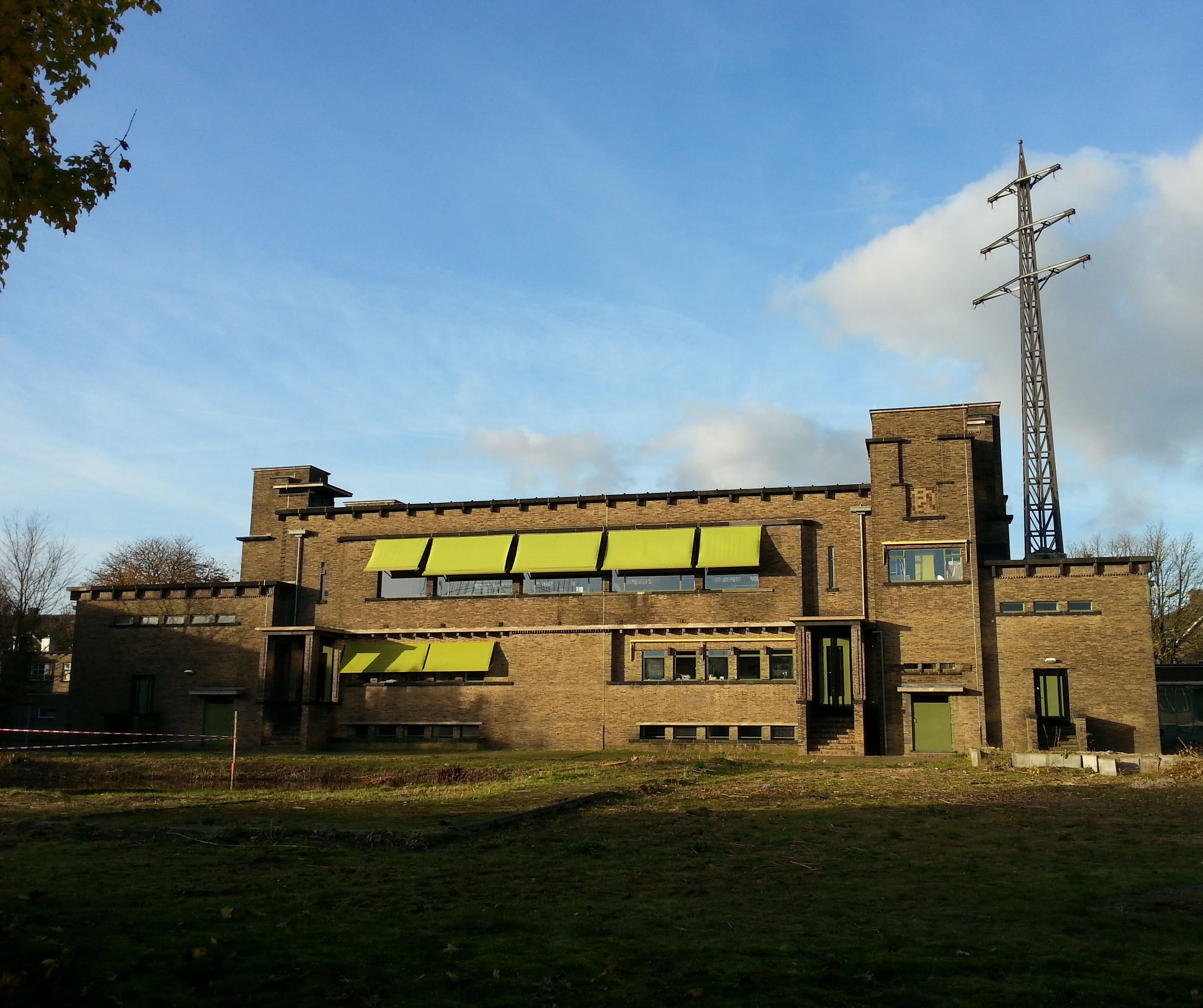 Bedieningsgebouw onderstation PGEM, Van Oldenbarneveldtstraat 90, Arnhem